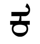 какараву